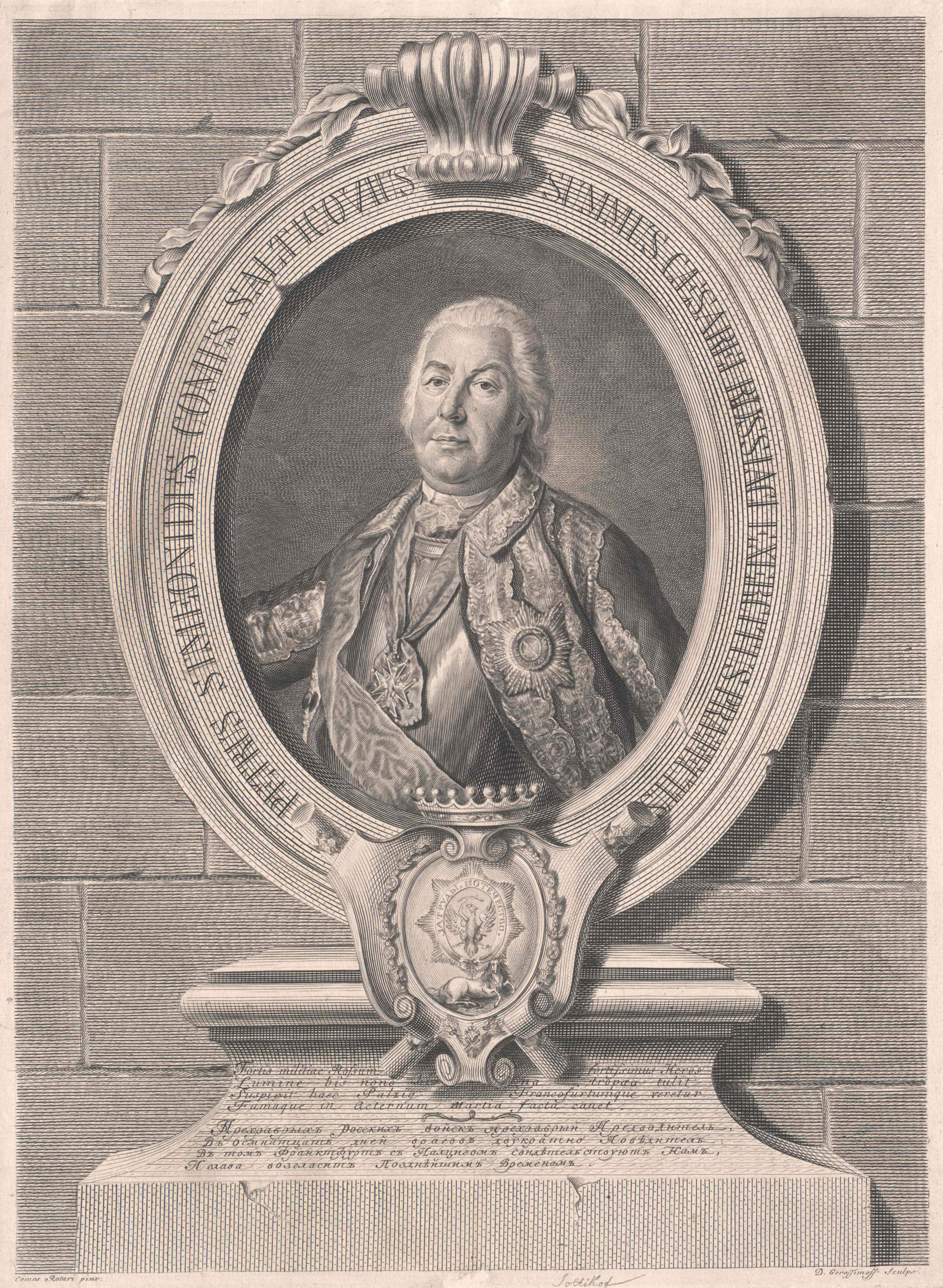 Peter Semenowitsch Saltykow (russischer Feldmarschall, 1700-1772), Stich in der Österr. Nationalbibliothek